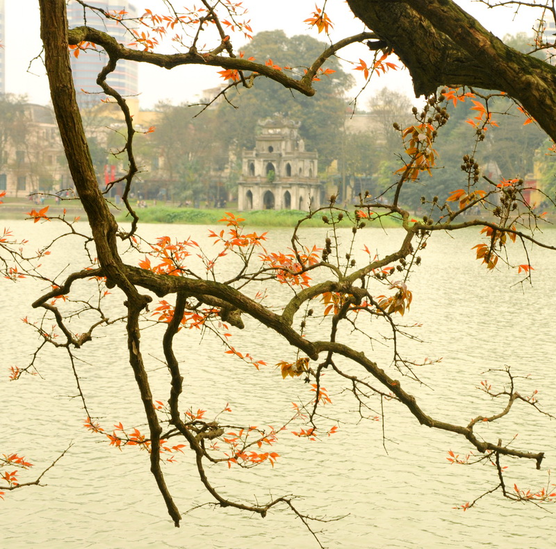 Hồ Gươm muôn đời vẫn thế